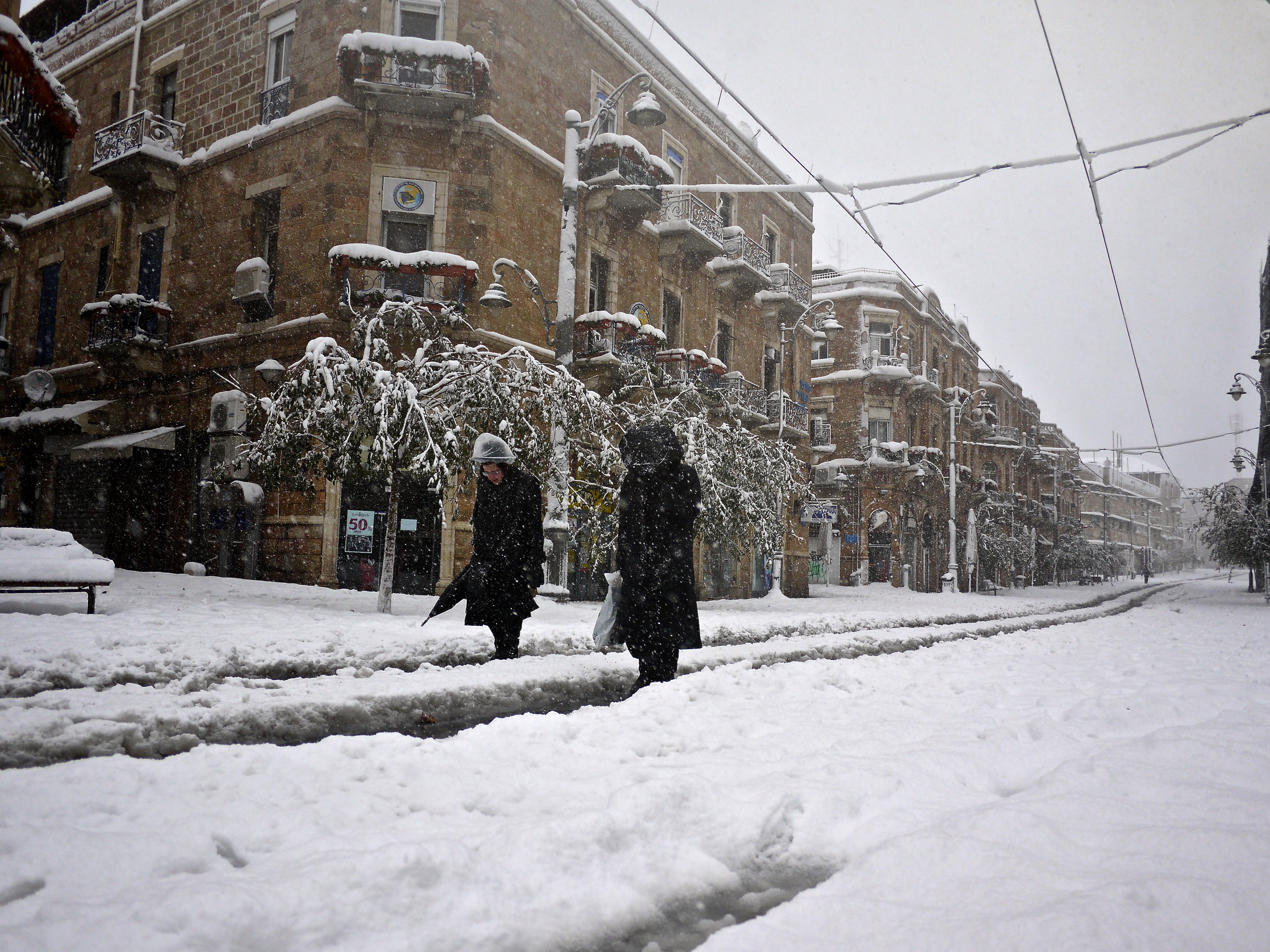 jaffa road Jerusalem